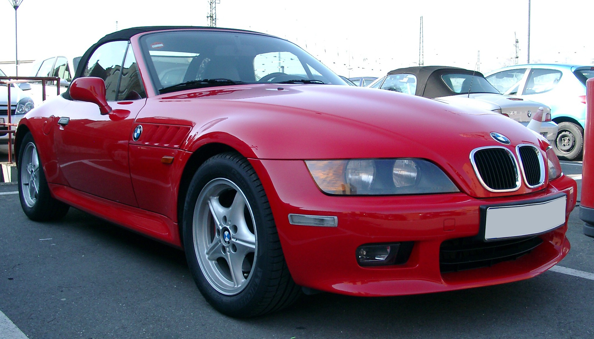 BMW Z3